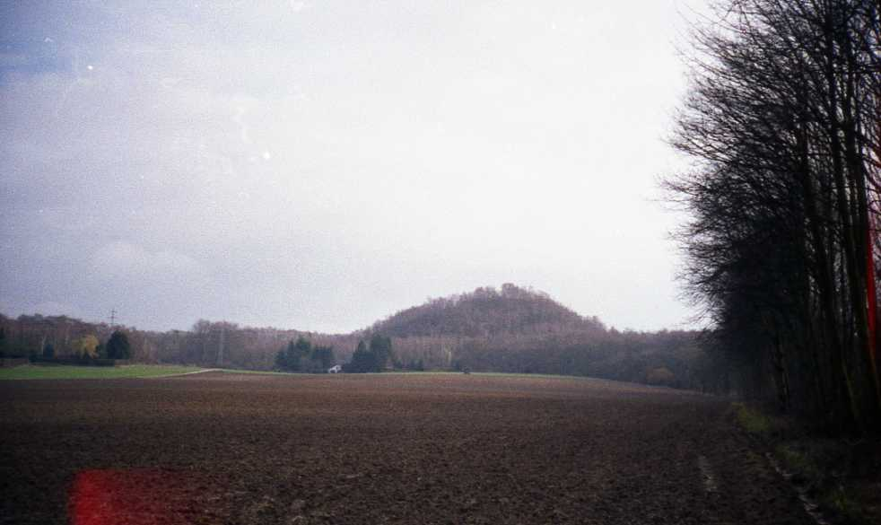 Schwarzer Berg bei Eschweiler, von 1888 bis 1944 engeschüttete 50 m hohe Berghalde